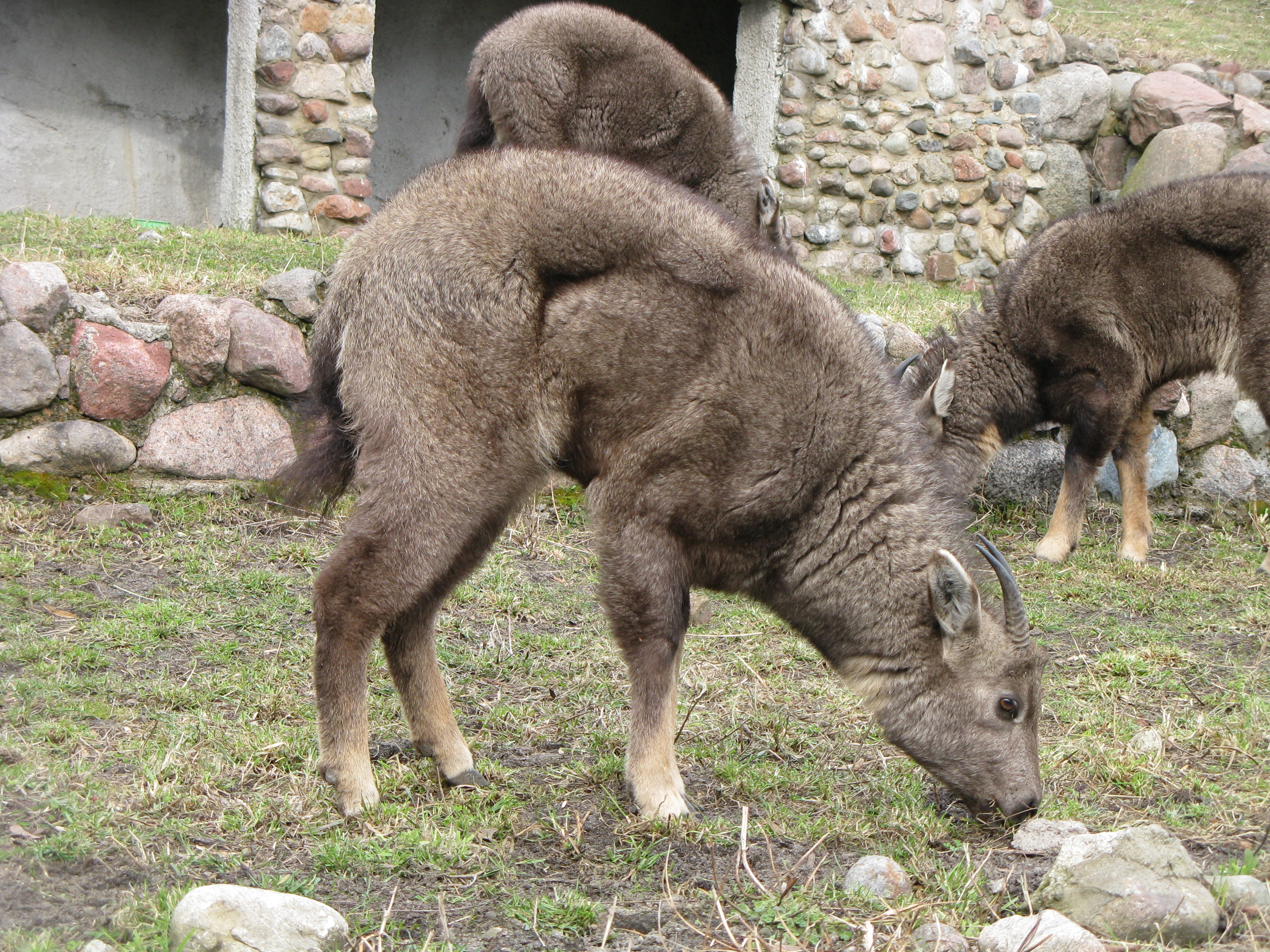 goral długoogoniasty (Naemorhedus caudatus) w ogrodzie zoobotanicznym w Toruniu